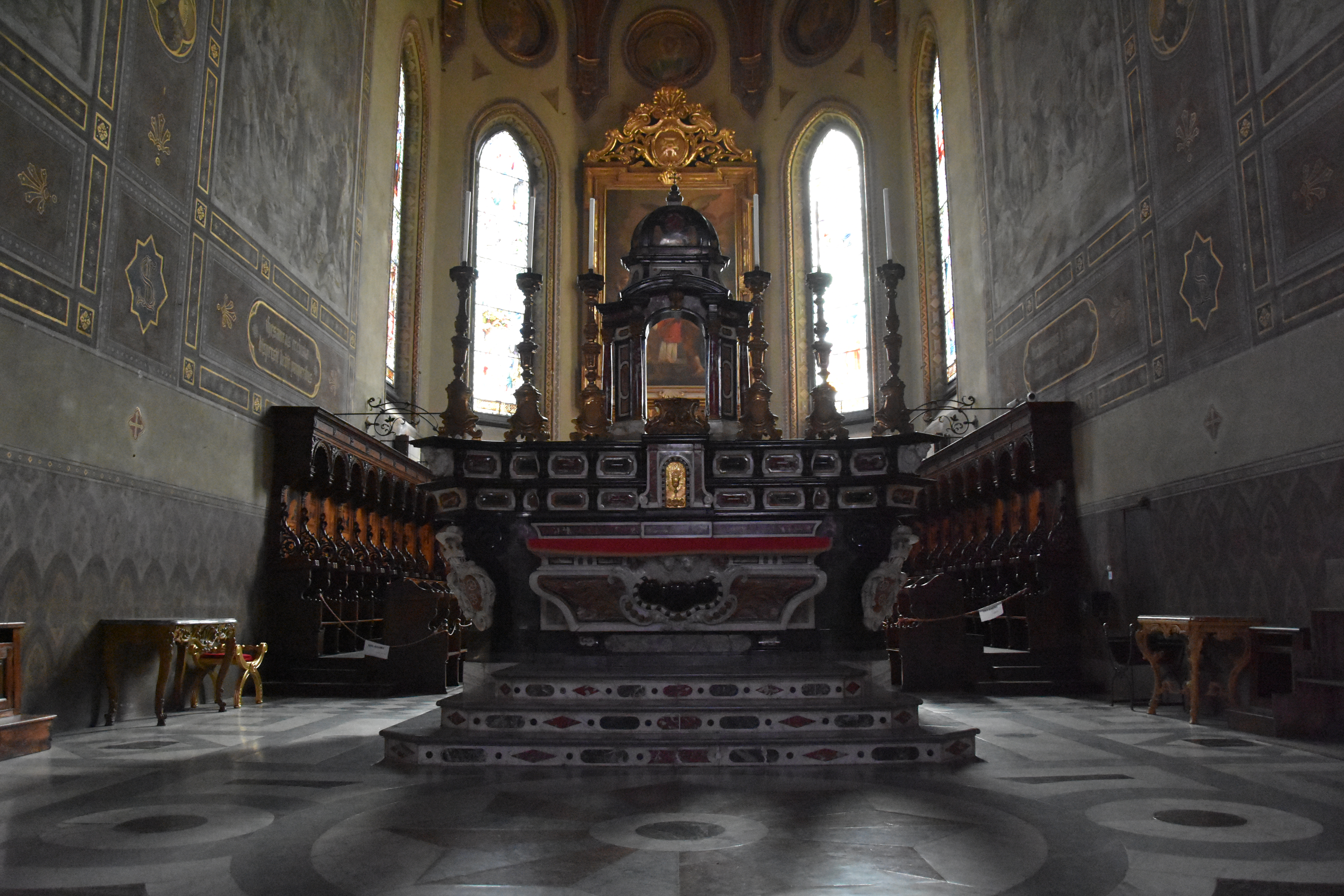 Interno del duomo di Alba, abside e altare maggiore.